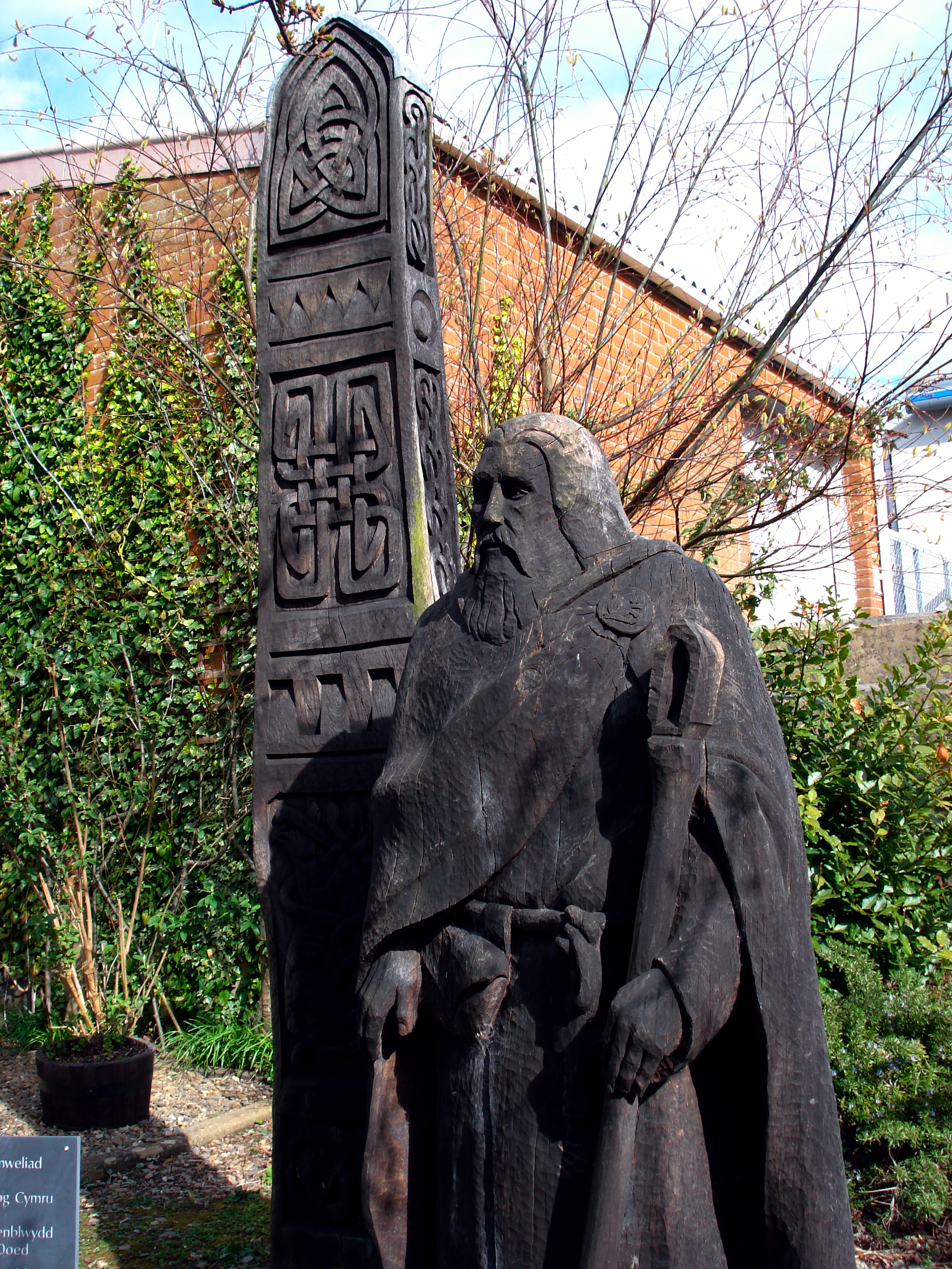 Cerflun ar bwys yr Abaty, Llandudoch. St Dogmael, in his village near Cardigan, west Wales.